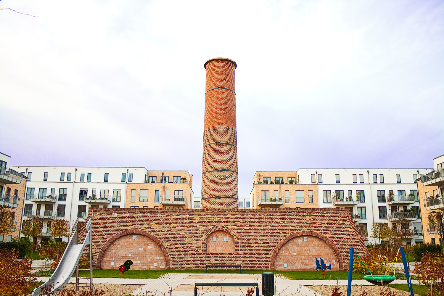 Ringofen der alten Ziegelei Sassen. "Am Ringofen", Düsseldorf-Ludenberg.